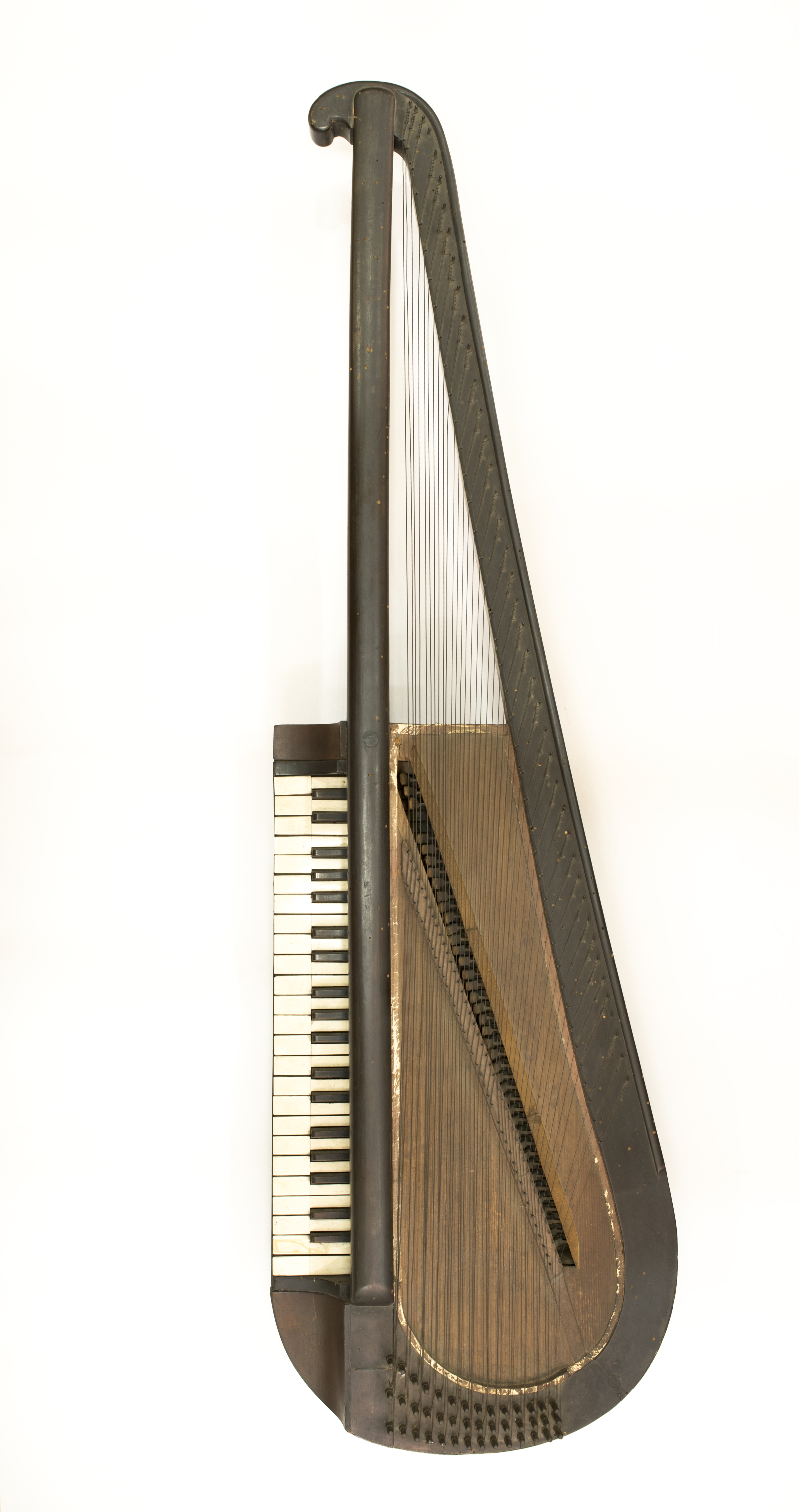 Pla general d'una òrfica del fons del Museu de la Música de Barcelona